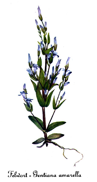 Watercolor painting of Gentianella_amarella.